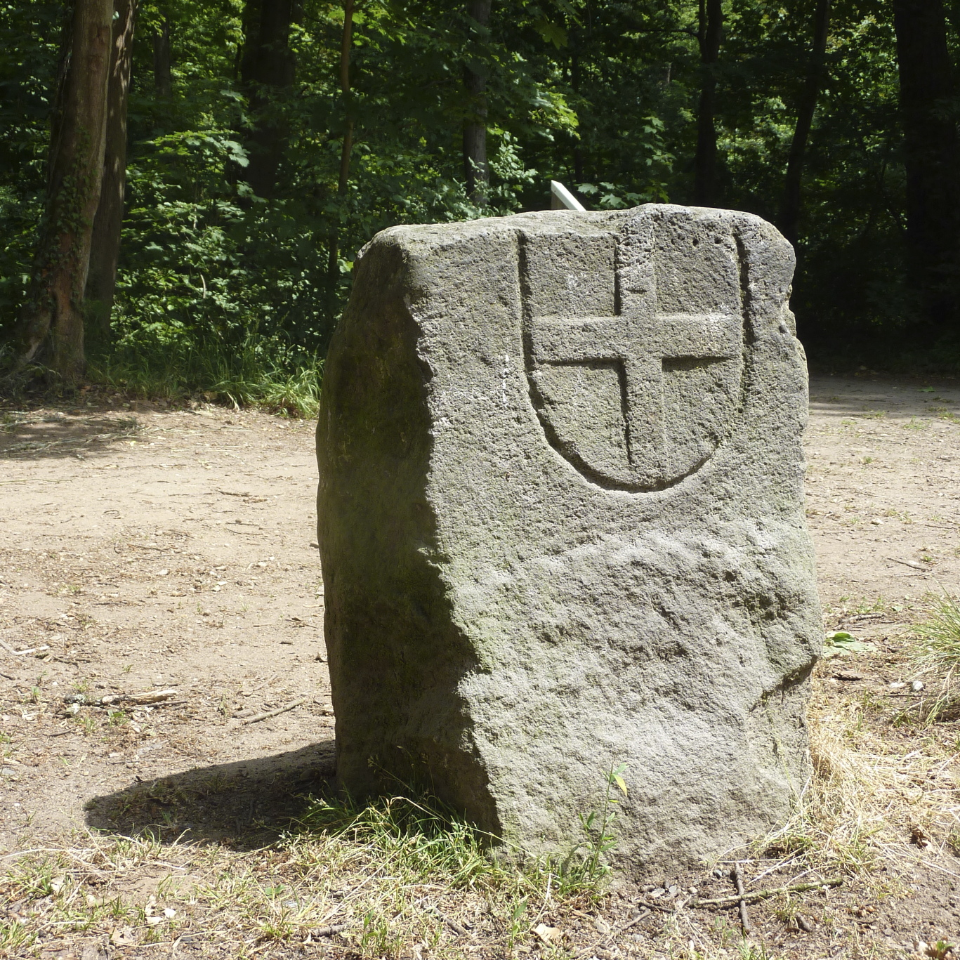 Der Schäfersteinpfad ist ein historischer Grenzweg aus dem 15. Jahrhundert in der Stadt Frankfurt am Main. Der Pfad markierte seit dem Jahr 1448 die Grenze zweier als Viehweide genutzer bewaldeter Gebiete (Hutewald) im Frankfurter Stadtwald – die der Stadt Frankfurt und die der in Sachsenhausen ansässigen Kommende des Deutschen Ordens. Die zur Markierung aufgestellten Grenzsteine tragen auf der einen Seite ein spiegelverkehrtes Fraktur-F als Symbol für Frankfurt, auf der gegenüberliegenden Seite das Wappen des Deutschen Ordens mit Balkenkreuz. Das Foto zeigt einen der Grenzsteine mit Symbol des Deutschen Ordens. Standort: Kreuzung der Waldwege Welscher Weg/Oberschweinstiegschneise.